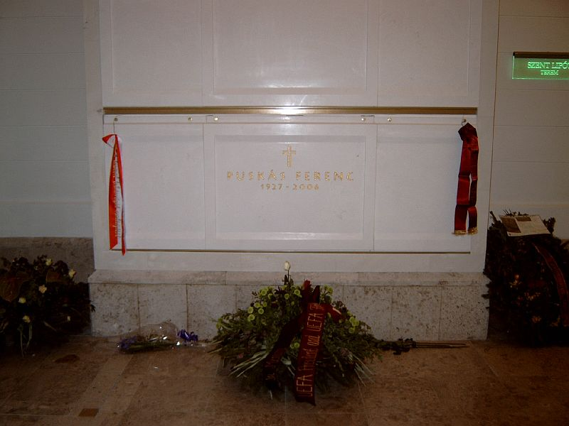 Puskás Ferenc (született: Purczeld Ferenc, közismert becenevén Puskás Öcsi; Budapest, 1927. április 1. – Budapest, 2006. november 17.) labdarúgó, edző, az Aranycsapat kapitánya, a Nemzet Sportolója sírja Budapesten. Szent István-bazilika, V. Szent István tér.